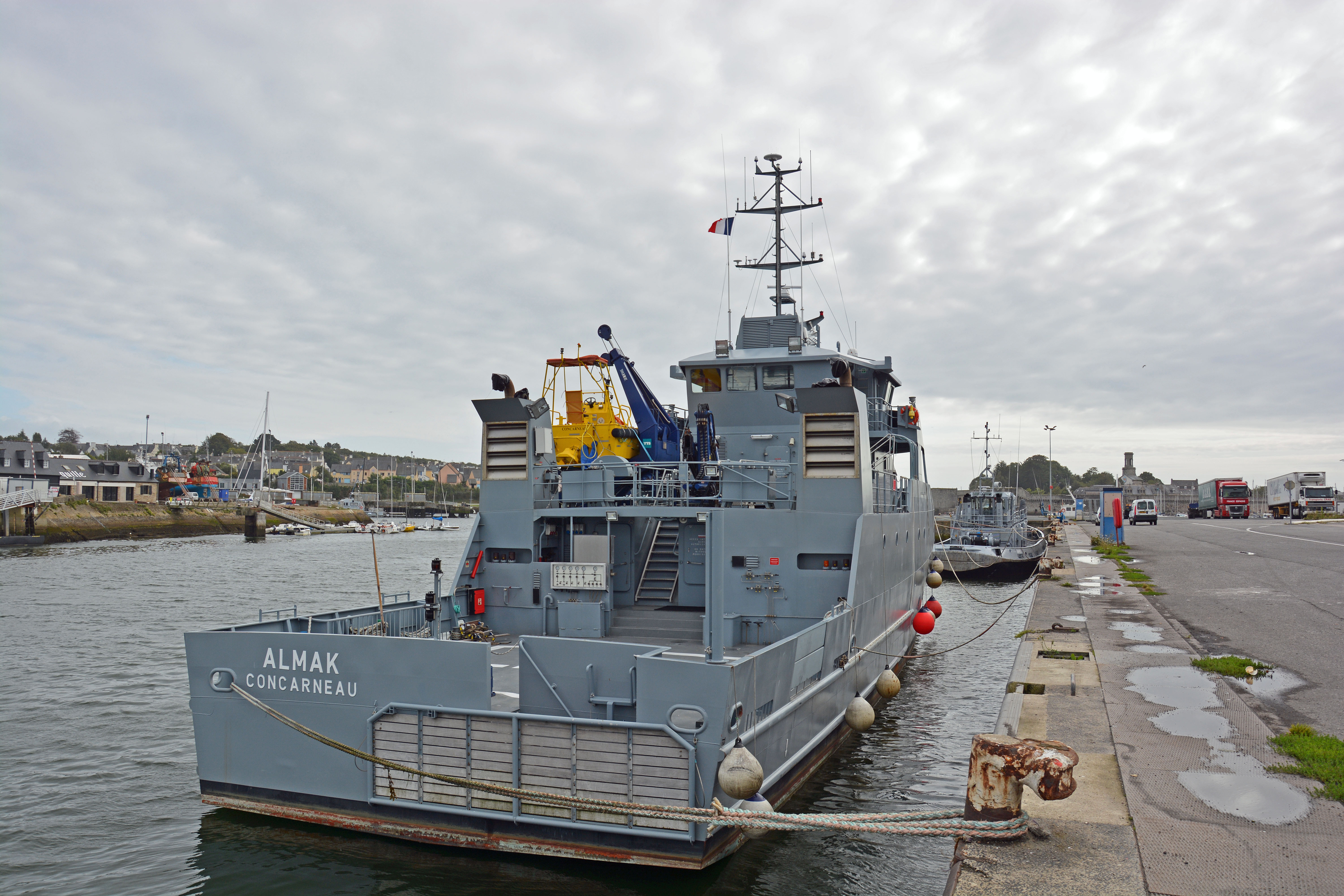 L'Almak à quai à Concarneau